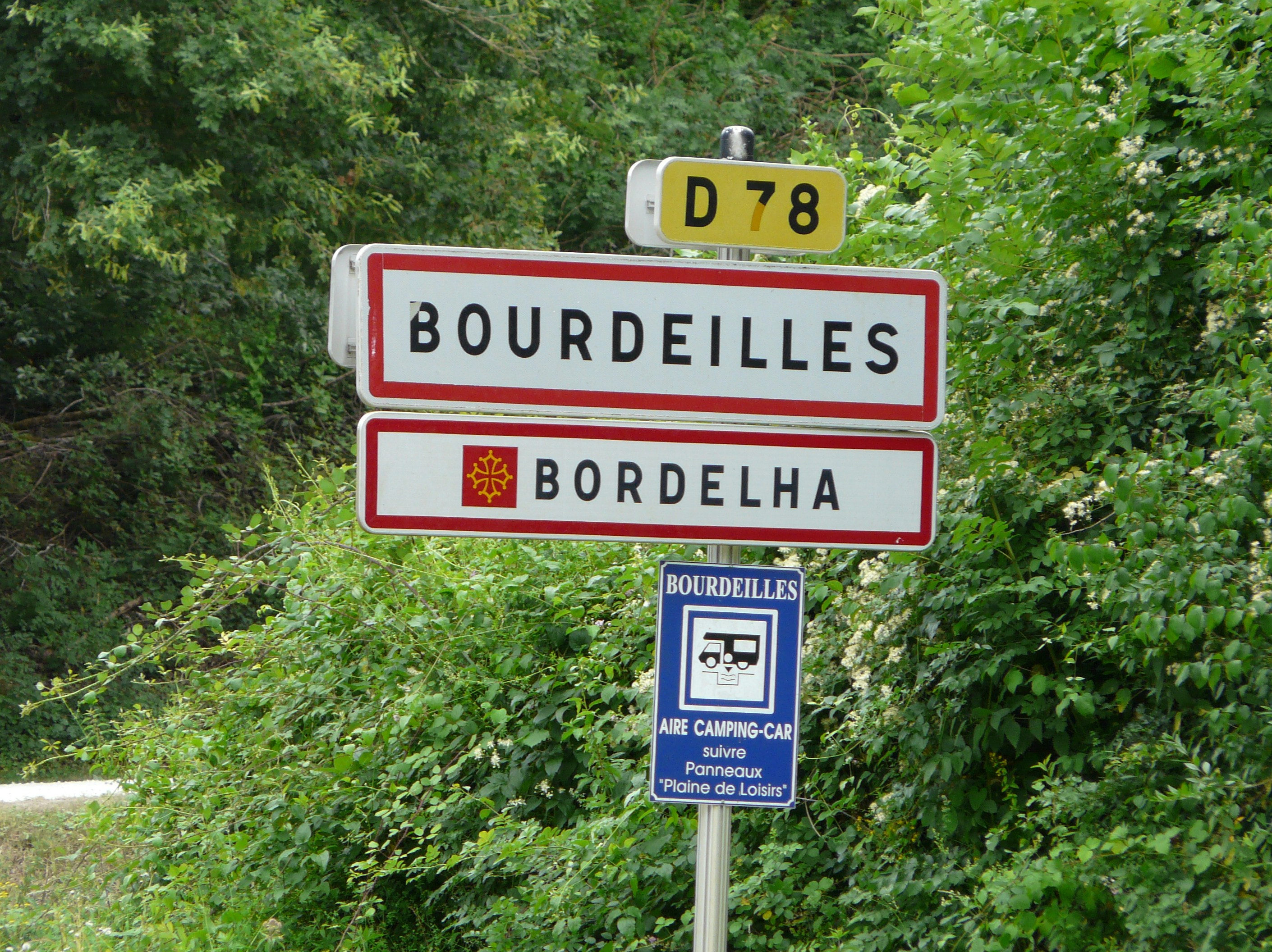 Sur la route départementale 78, panneau bilingue français-occitan d'entrée dans Bourdeilles, Dordogne, France.